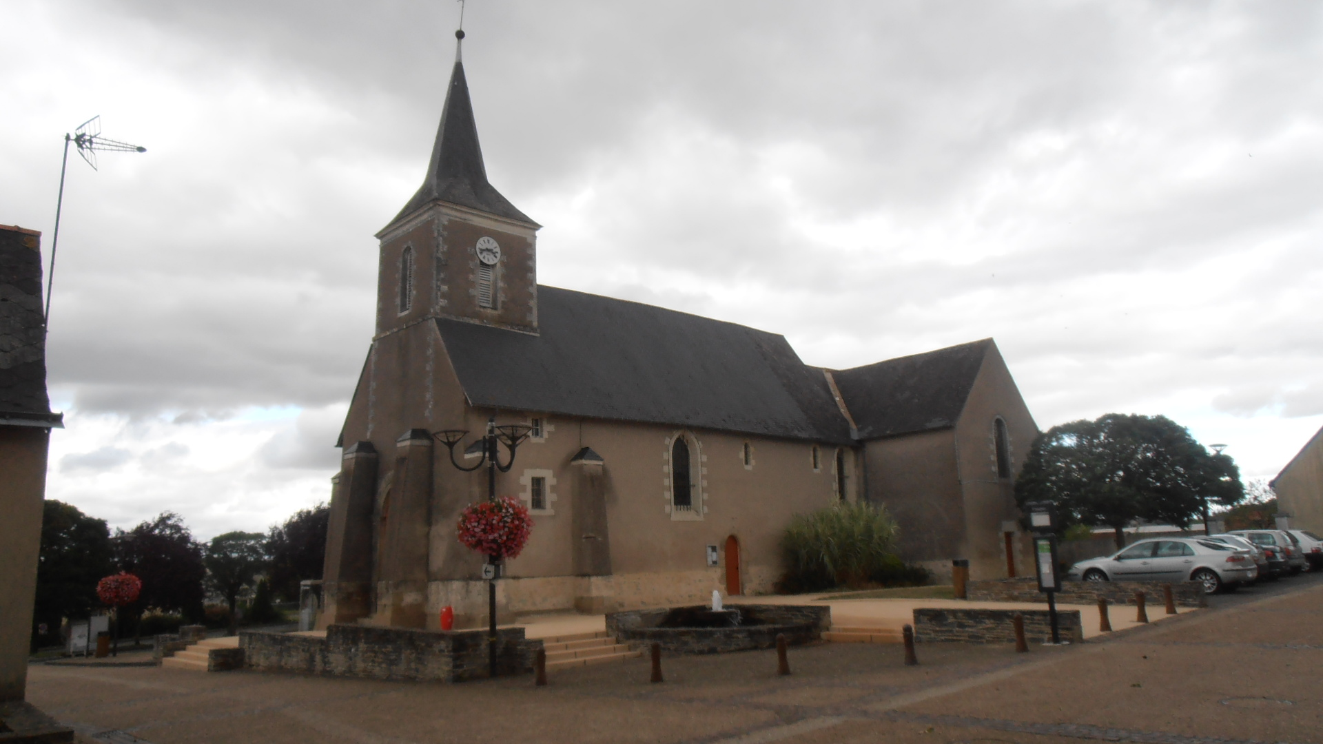 L'église de Saint-Lambert-la-Potherie (Maine-et-Loire, France).